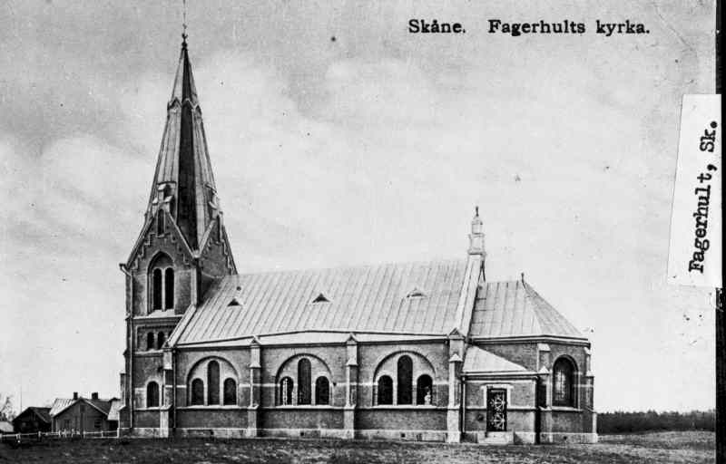 Kyrkan från söder. Kategori: (01) ExteriörerKyrkan från söder.